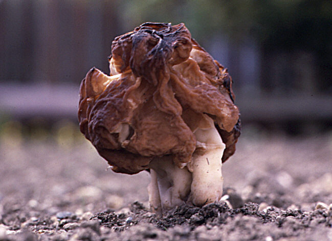 Frühjahrslorchel Fotograf: Walter J. Pilsak, Waldsassen Copyright Status: GNU Freie Dokumentationslizenz